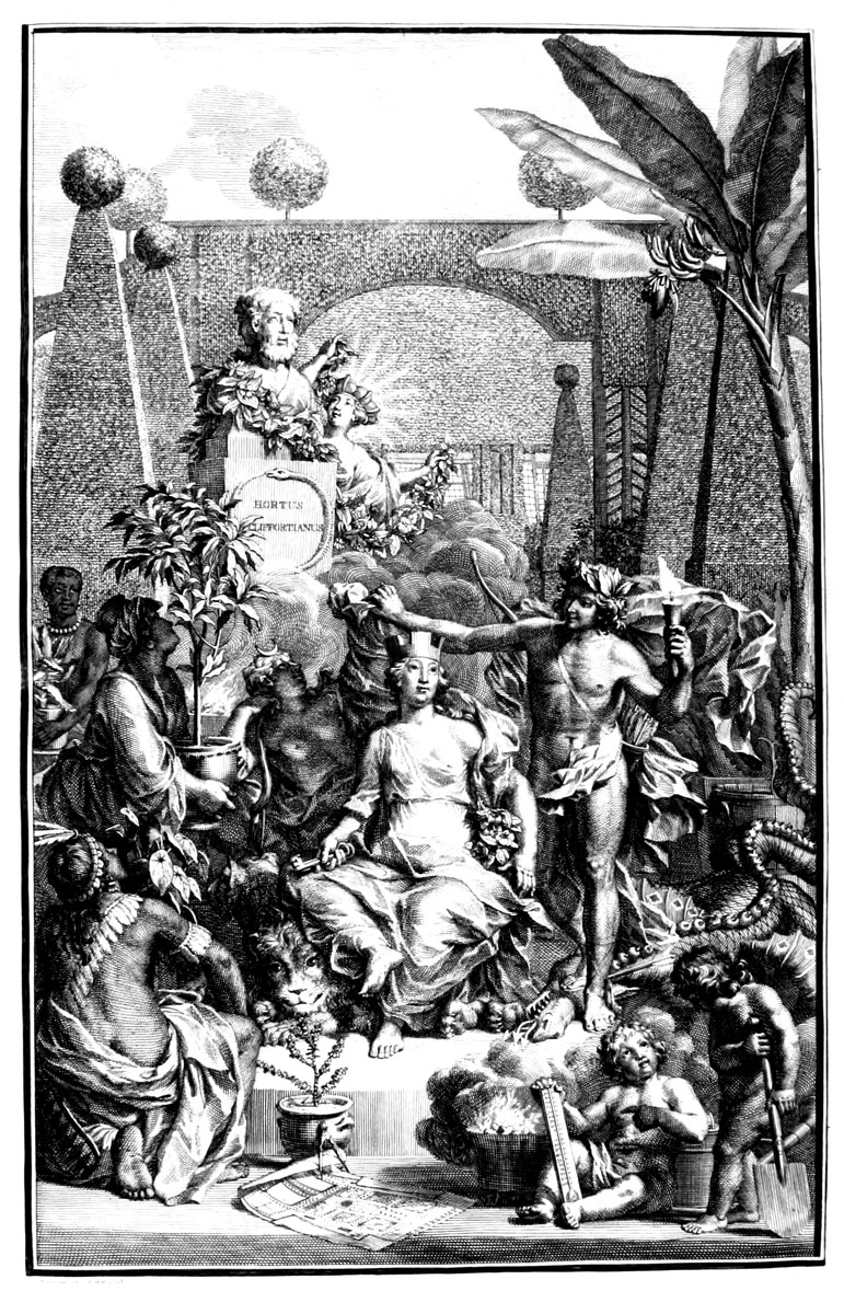 Frontspiz von Carl von Linnés Hortus Cliffortianus, 1. Auflage, 1737